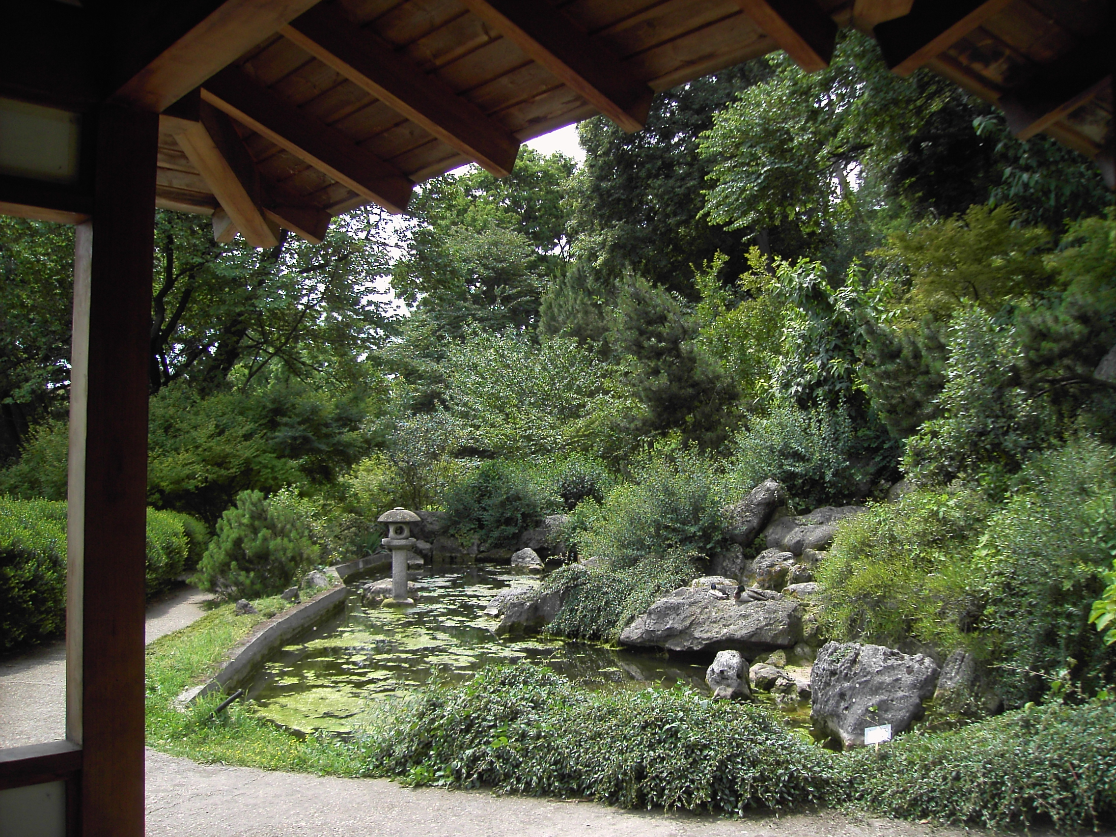 Roma , Orto botanico: il giardino giapponese